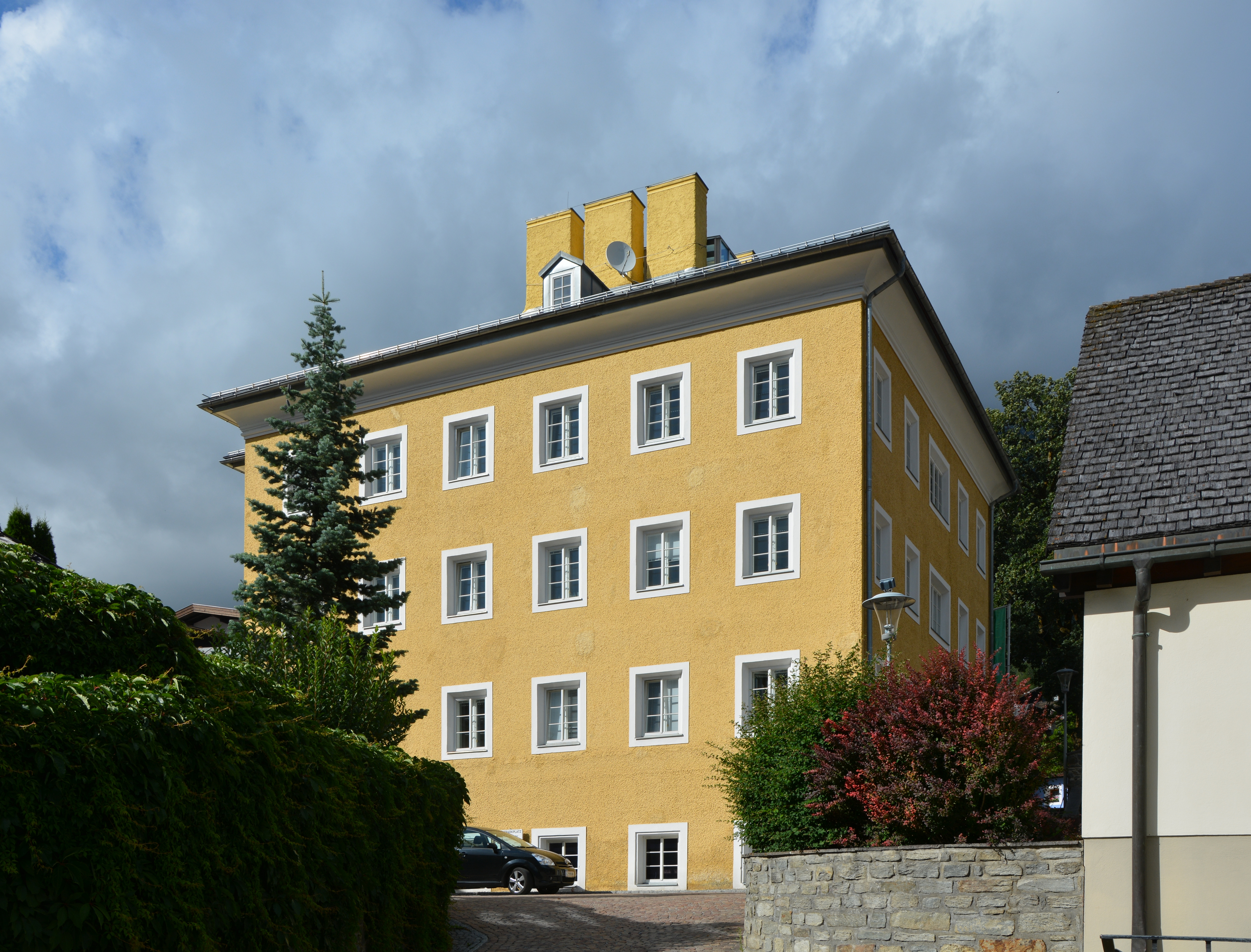 Alte Volksschule bzw. Nationalparkhaus in Matrei in Osttirol.